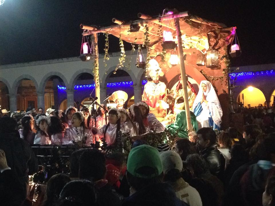 Desfile del Paseo de carros 25 de Diciembre en Uriangato, Gto.